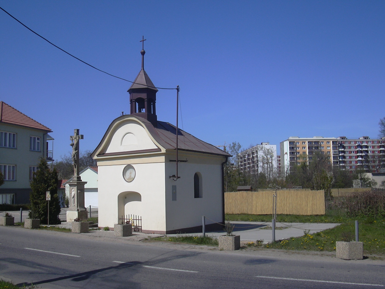 pohled na Křečkovice kapli(Vyškov- czech republic)